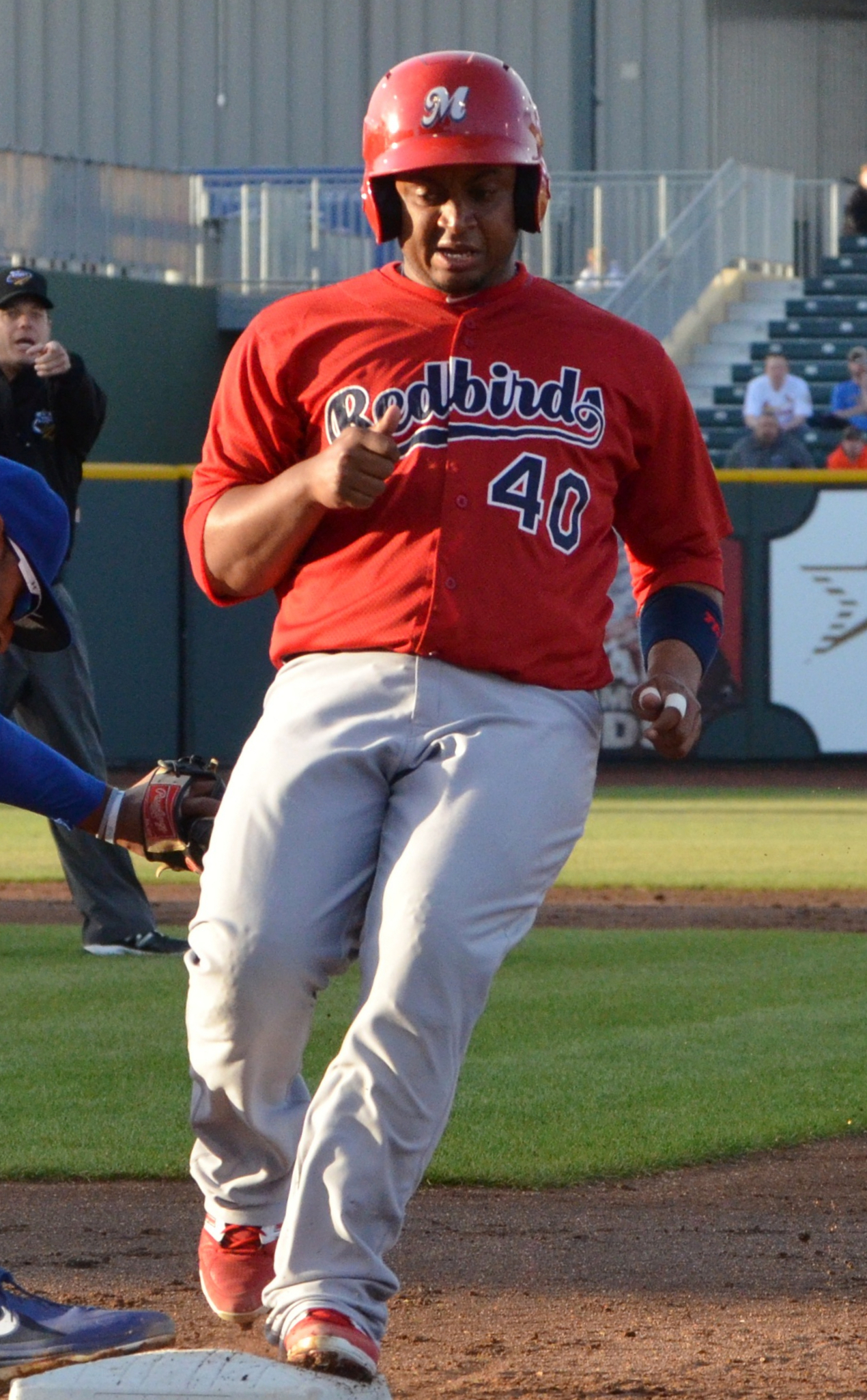 Audry Pérez